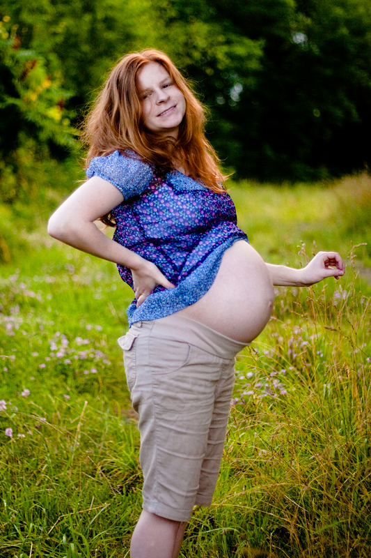 Mandy at 39 weeks + 4 days